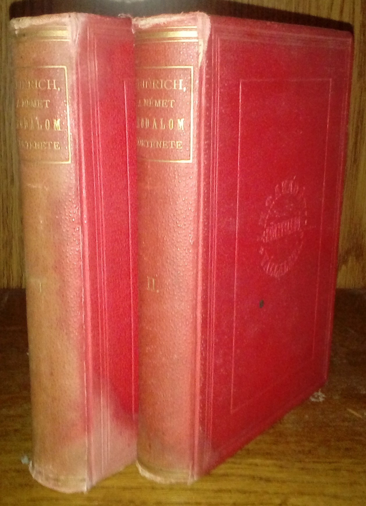 Heinrich Gusztáv: A német irodalom története